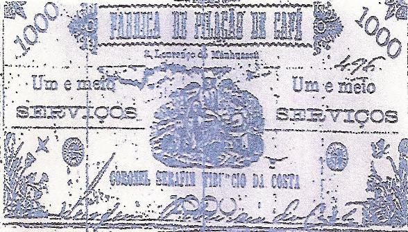 Boro. Moeda criada na REPÚBLICA MANHUASSÚ.